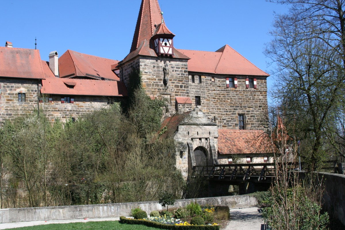 Schloss Lauf a.d. Pegnitz